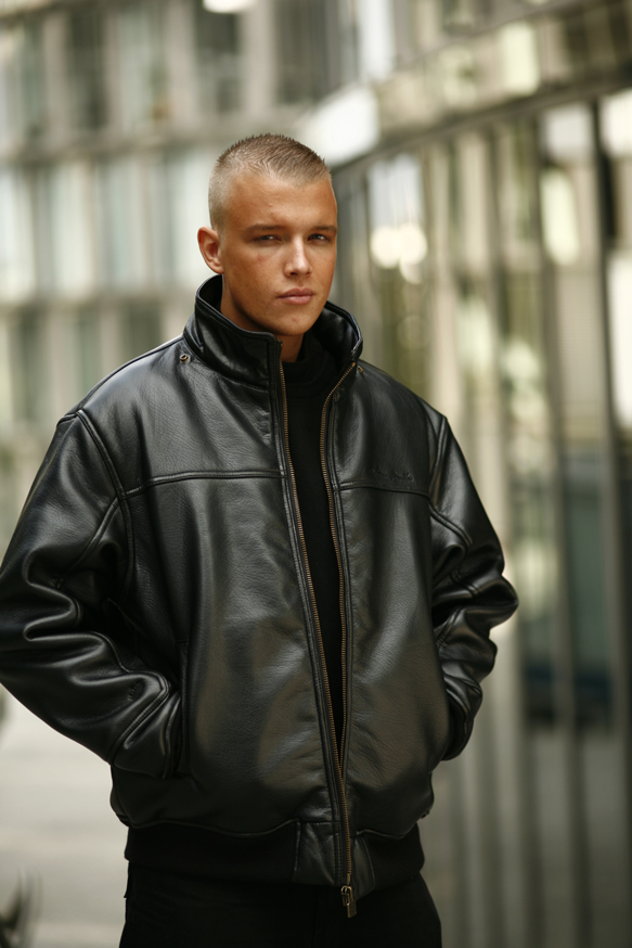 Deutscher Rapper Kollegah